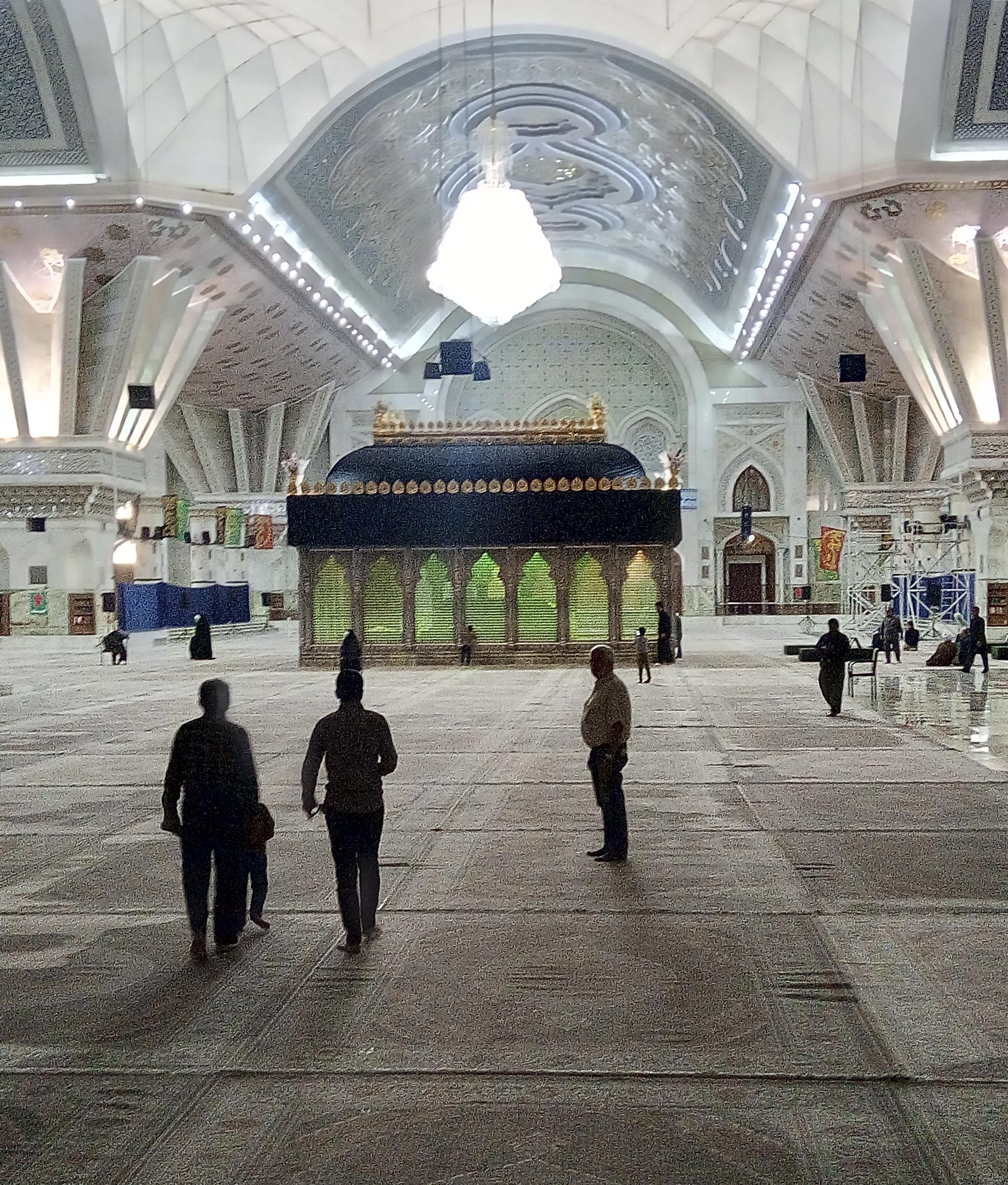 Das Mausoleum des Staatsgründers Chomeni beeindruckt durch Größe und Pracht